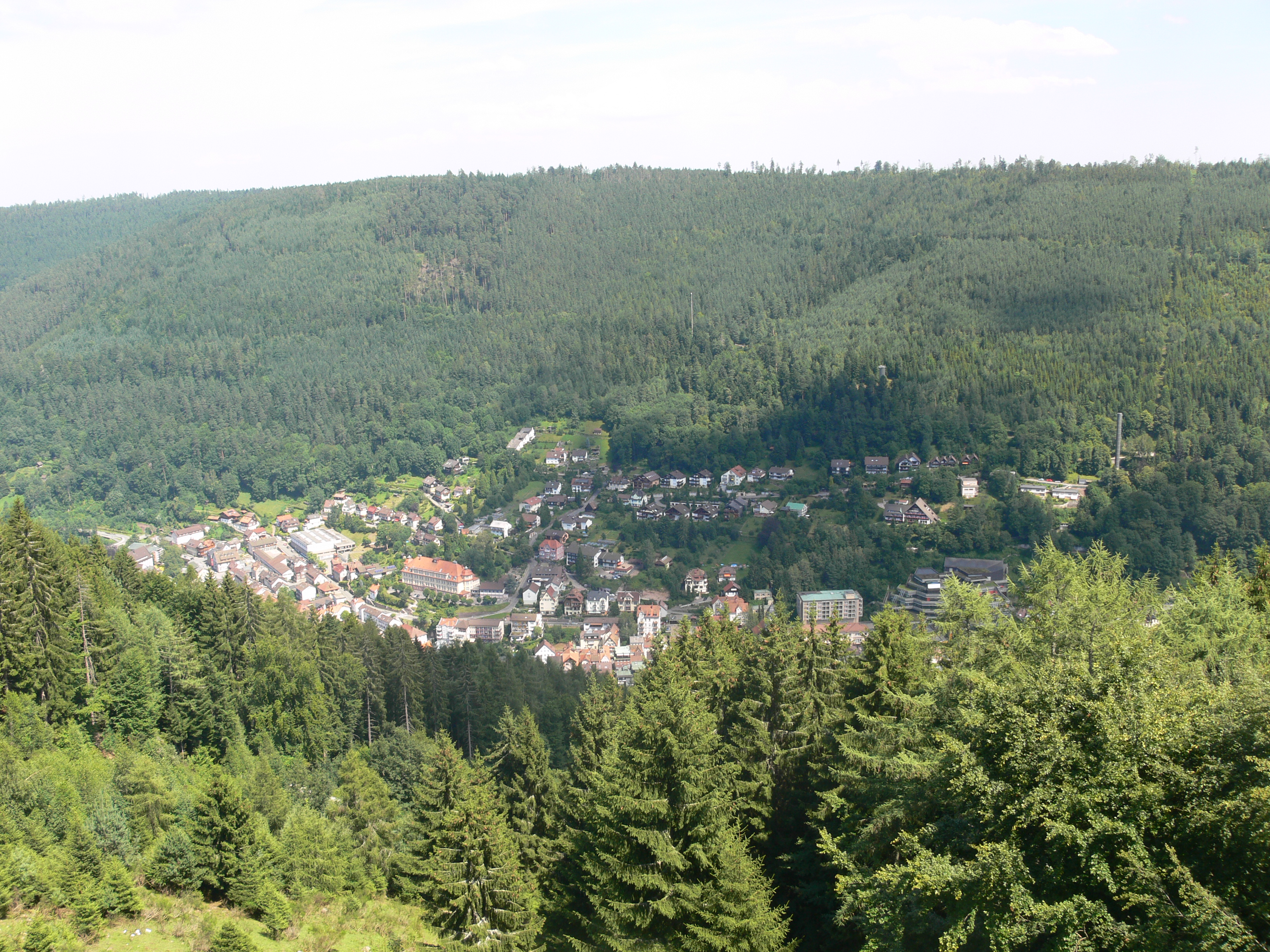 Bad Wildbad, Blick vom Sommerberg